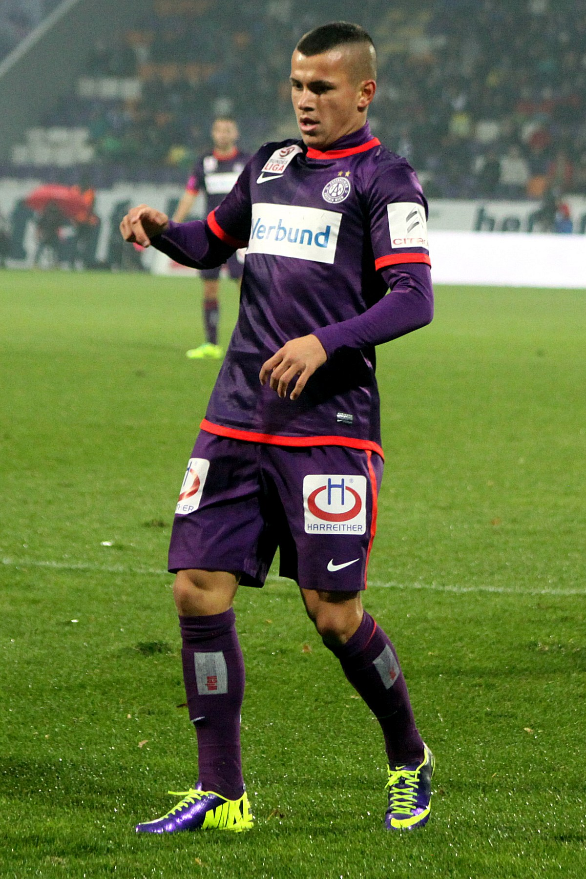 Meisterschaftsspiel der österreichischen Bundesliga: FK Austria Wien gegen FC Red Bull Salzburg (0:0) am 6. Oktober 2013 in Wiener Generali Arena. - Das Foto zeigt Srdan Spiridonovic (FK Austria Wien).